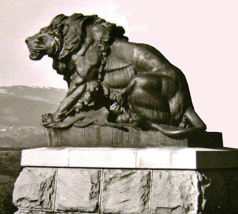 Hackher Löwe am Grazer Schloßberg von Otto Jarl ~1938